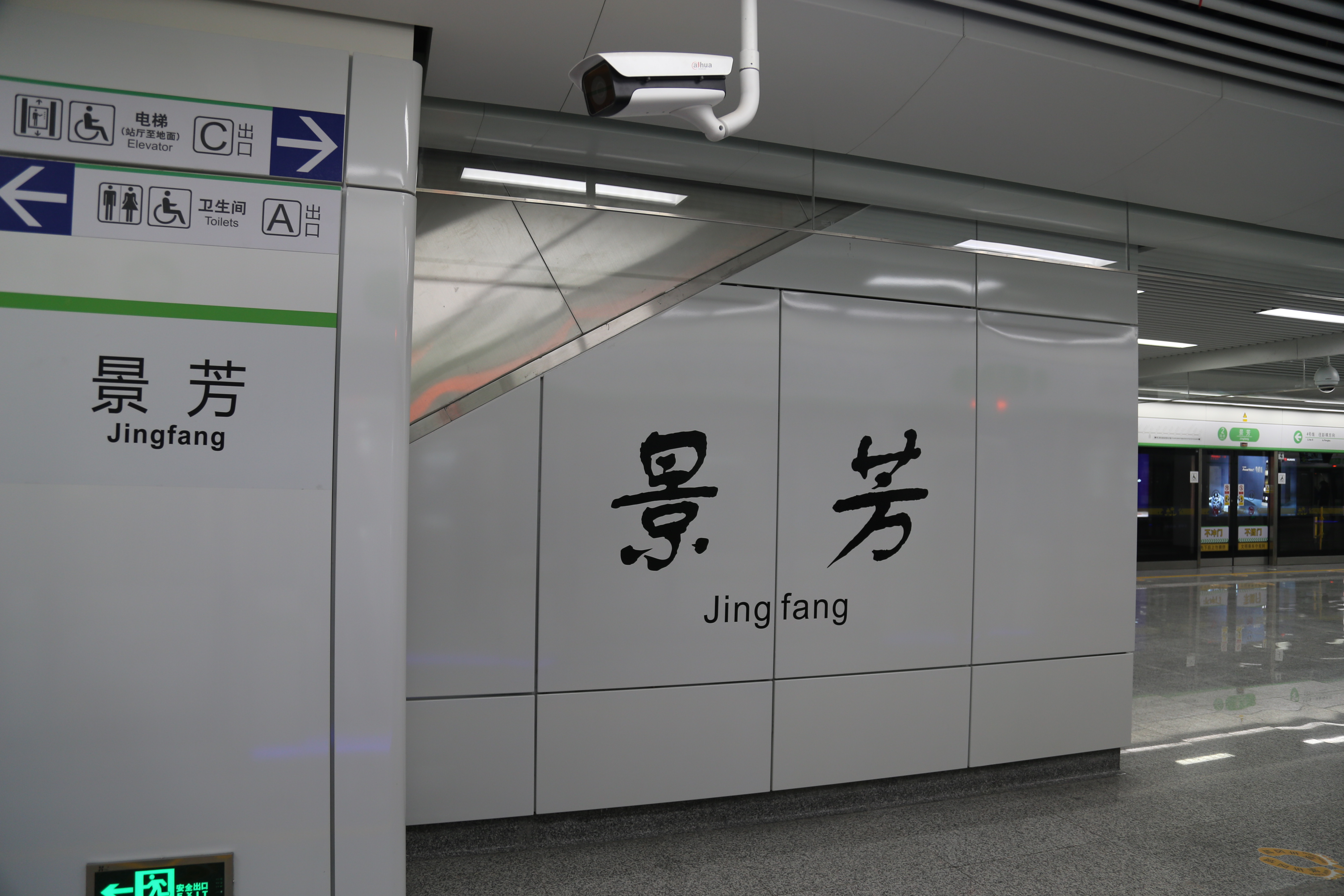 景芳站大字壁